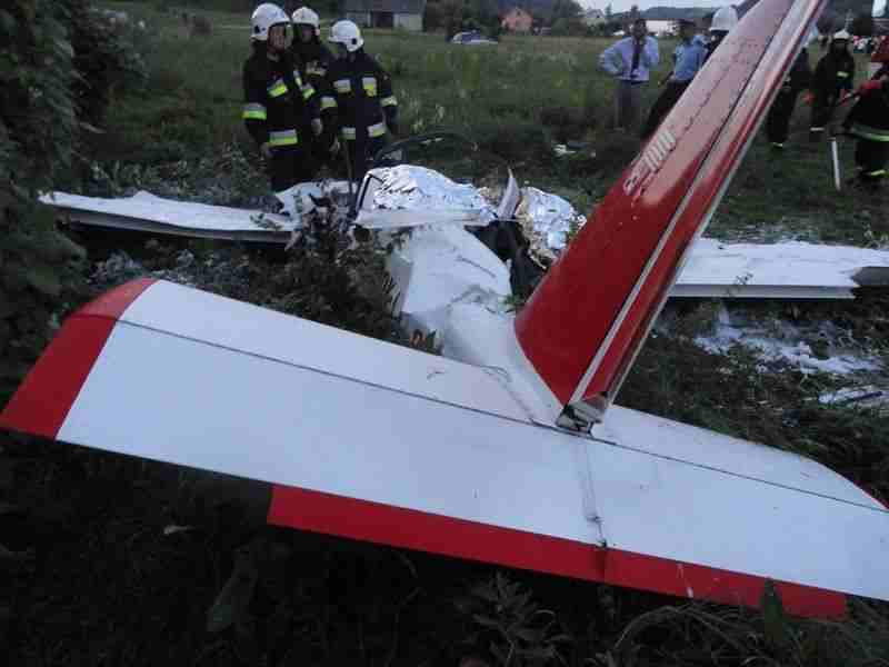 Zdjęcie z miejsca katastrofy lotniczej EV-97 Eurostar o znakach rejestracyjnych OK-LUR 03 w Witowicach Dolnych.